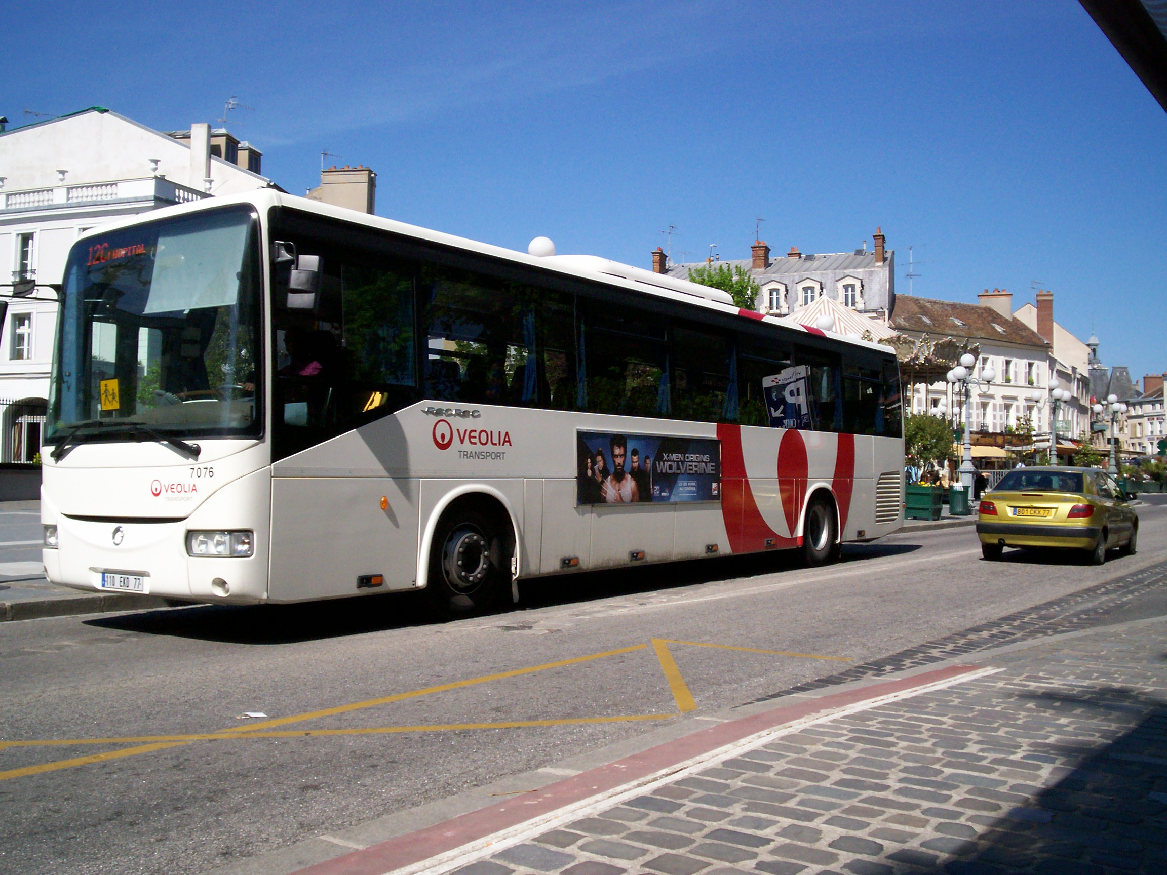 Un bus du réseau Veolia Transport Samoreau